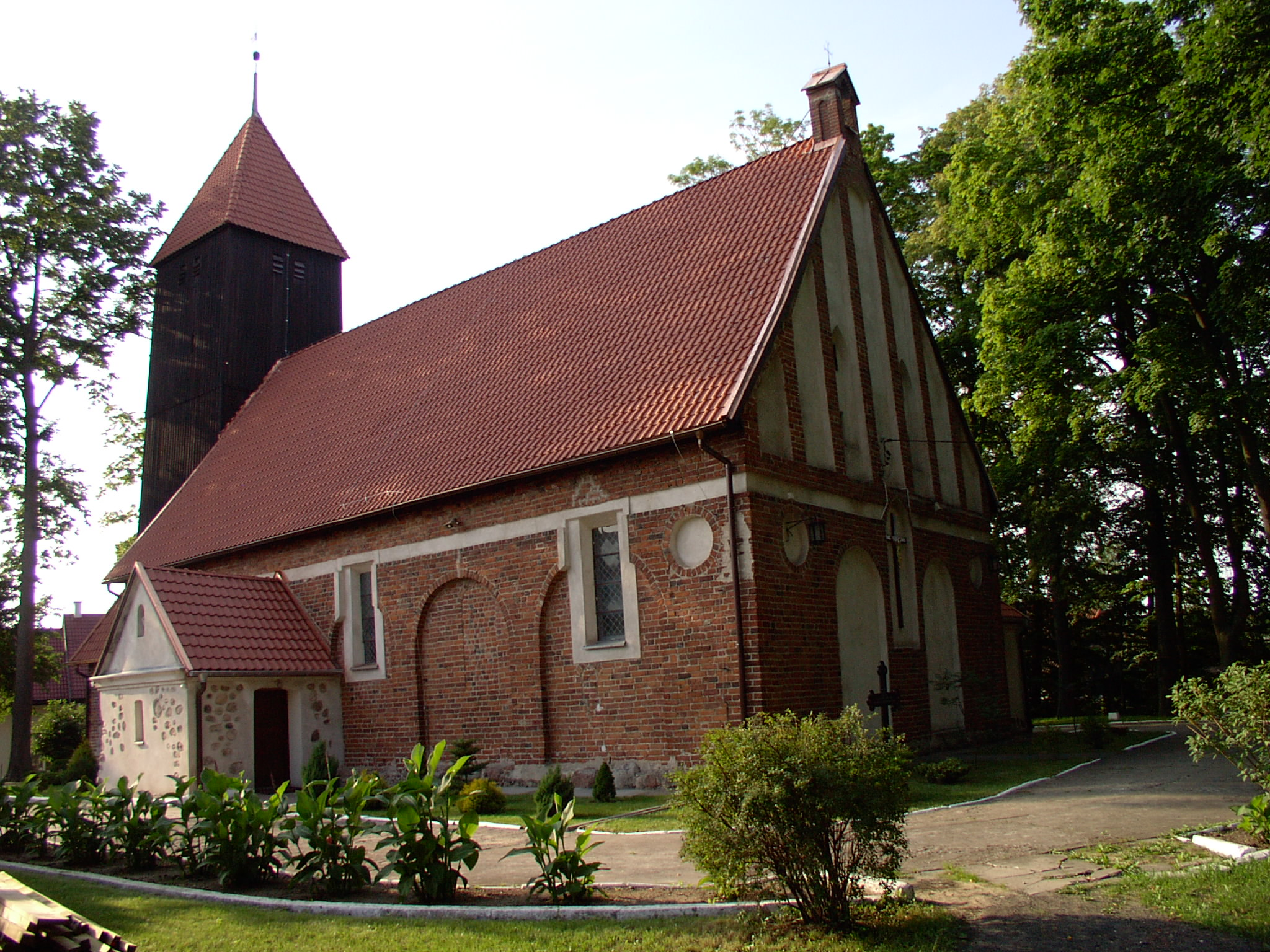 Olsztyn - kościół w Gutkowie, widok od tyłu (zabytek nr rejestr. A-844)